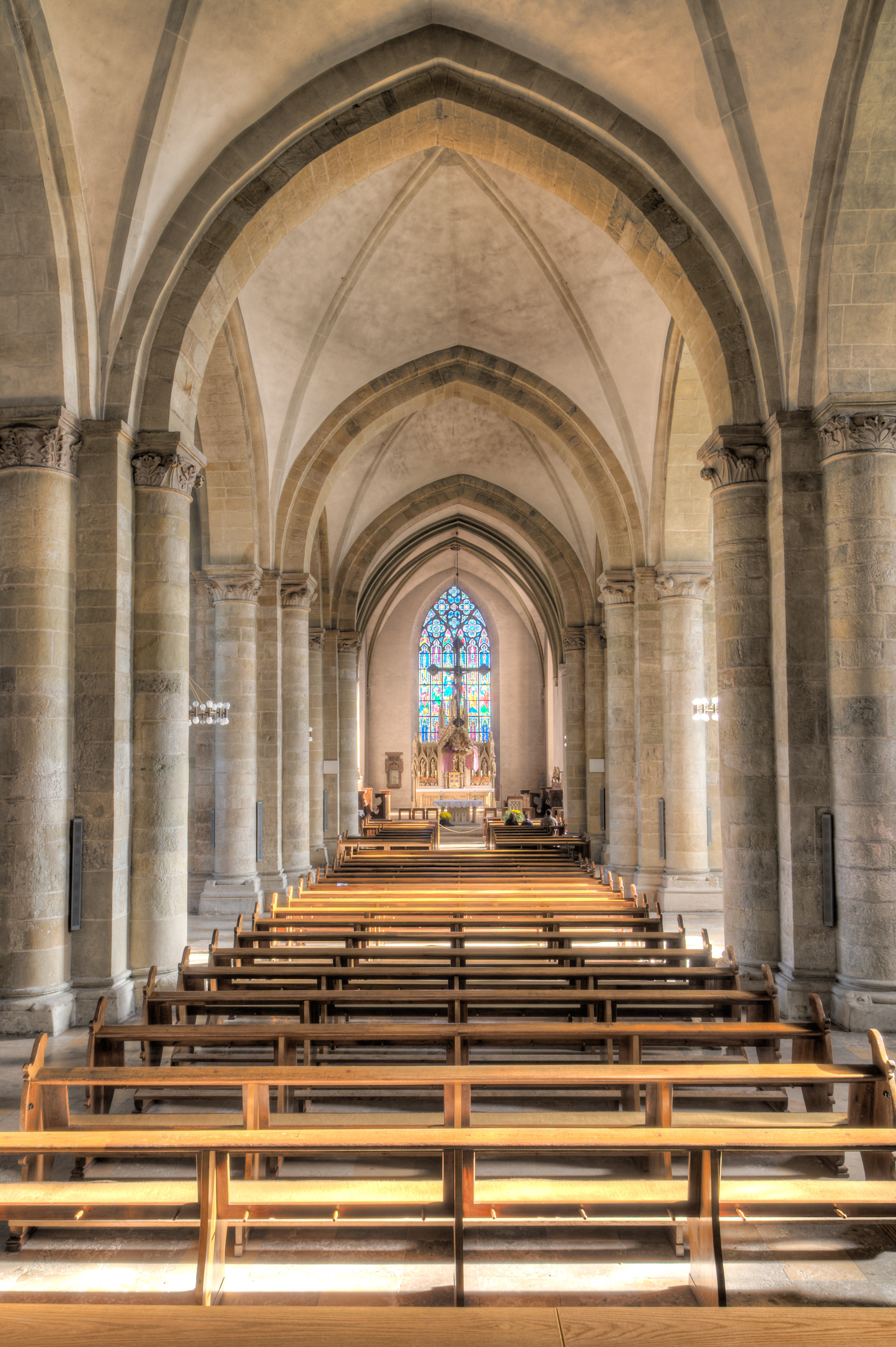 Blick auf den Hauptaltar der Prosteikirche St. Petrus und Andreas in Brilon.